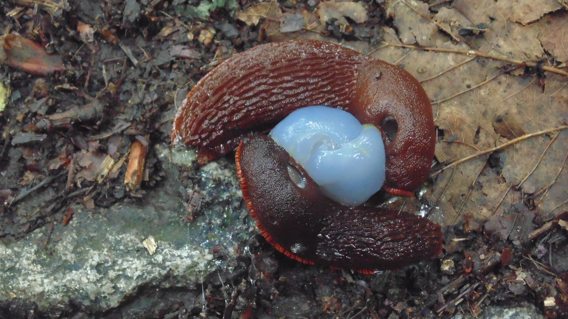 Dwa śliniki wielkie w trakcie aktu kopulacji